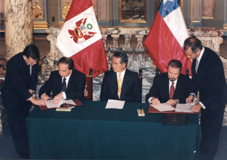 Firma del Protocolo sobre cláusulas pendientes del Tratado de 1929 por el ministro de Relaciones Exteriores de Chile, Juan Gabriel Valdés, y el presidente del Perú, Alberto Fujimori